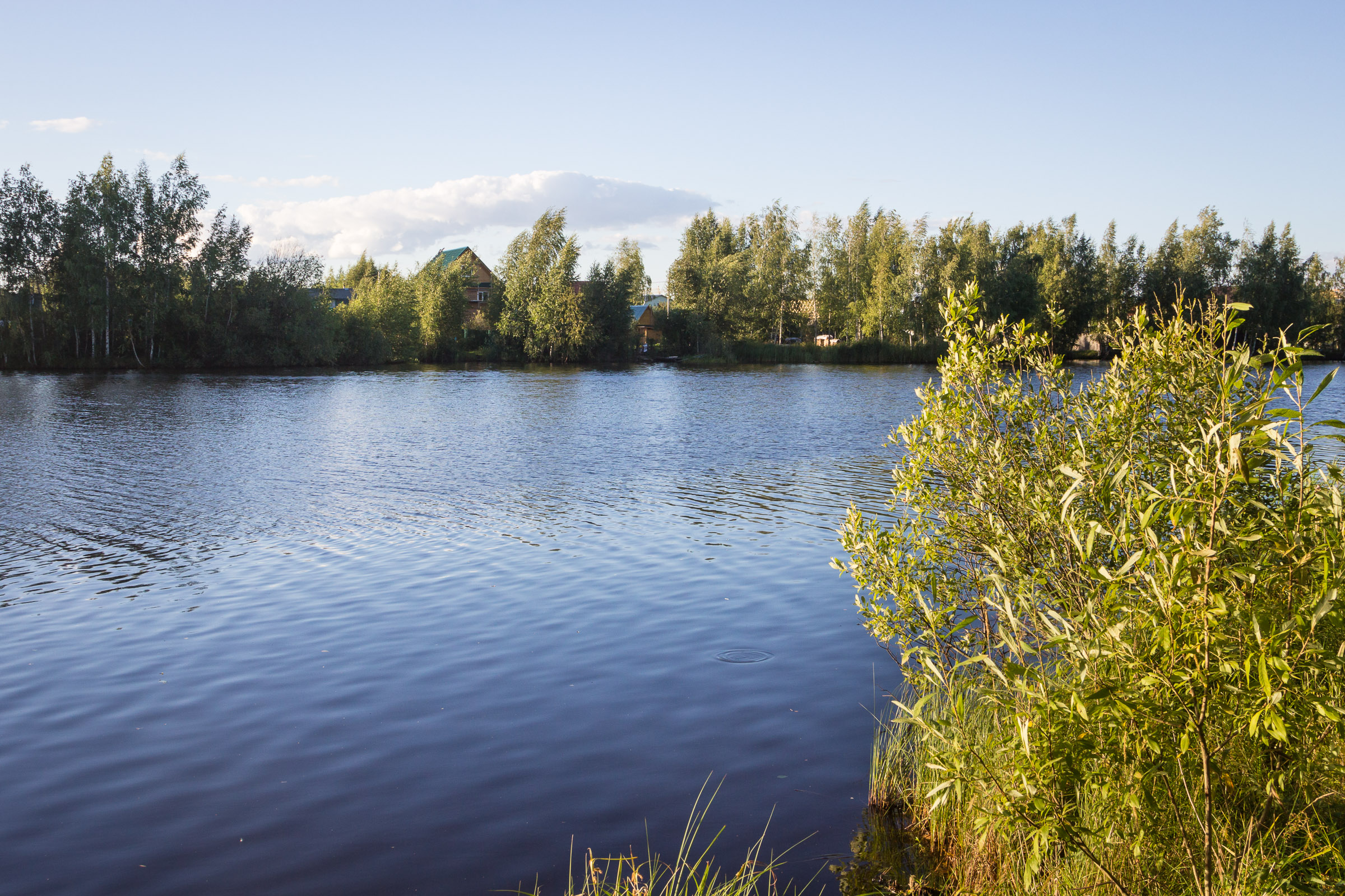 Нижний Новгород, Московский район. Река Параша близ аэродрома авиазавода "Сокол"